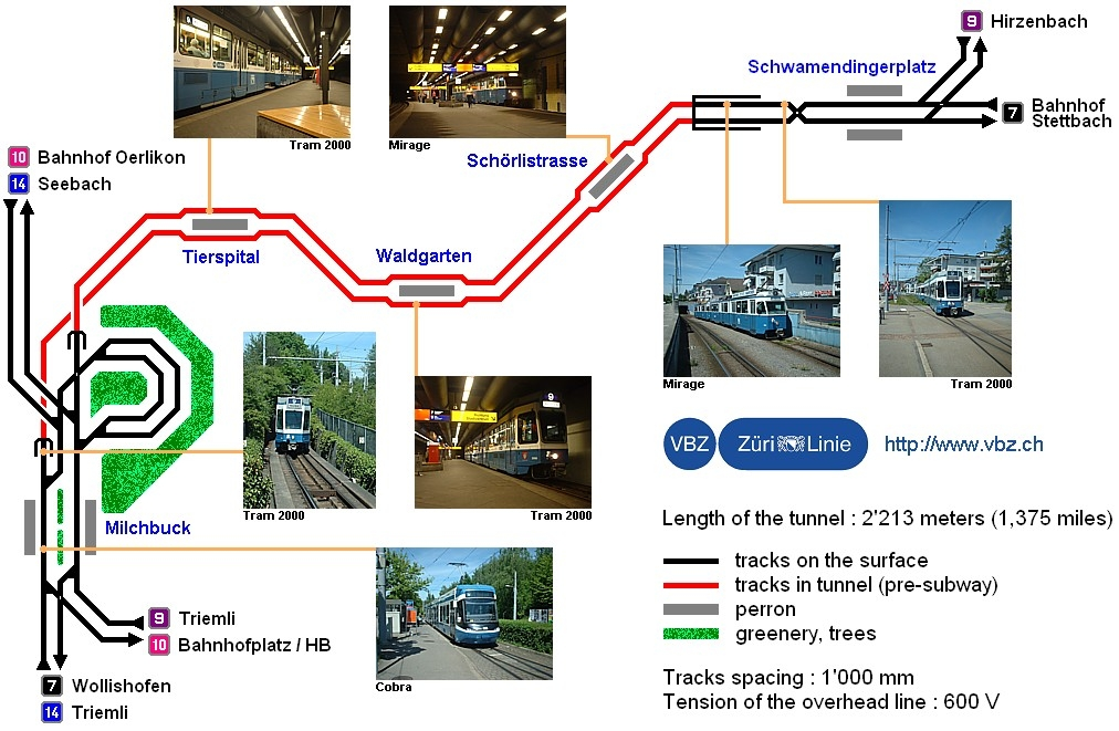 Plan du prémétro zurichois